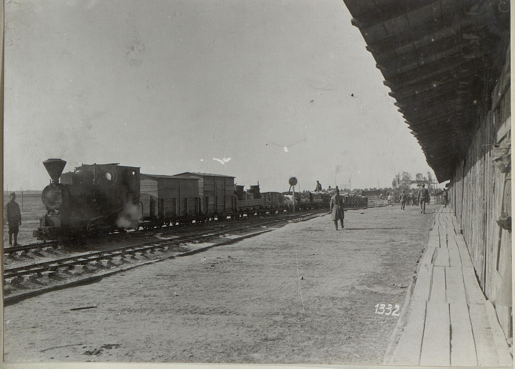 Etappenmagazin der 4. k.u.k. Armee nahe Kowel